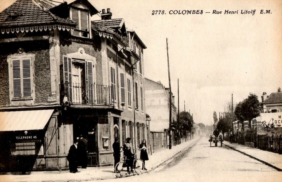 Colombes.Rue Henri-Litolff